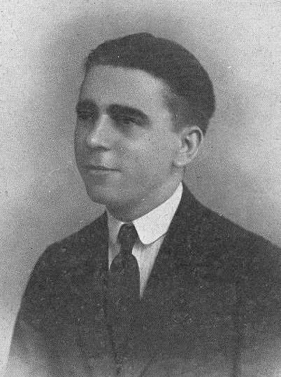 Ramón Canoura Fernández, fotografía en Vida Gallega 1926